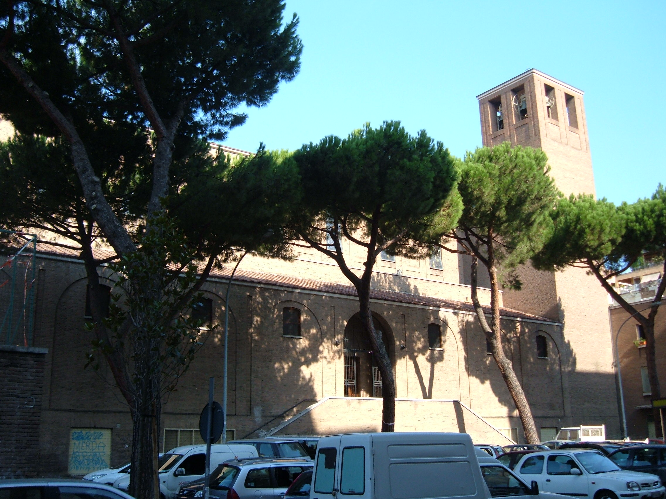 Chiesa di San Barnaba apostolo, a Roma, nel quartiere Prenestino-Labicano.